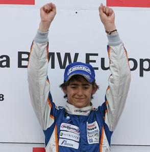 Imagen de Esteban Gutierrez como campeon de la Formula BMW Europa 2008